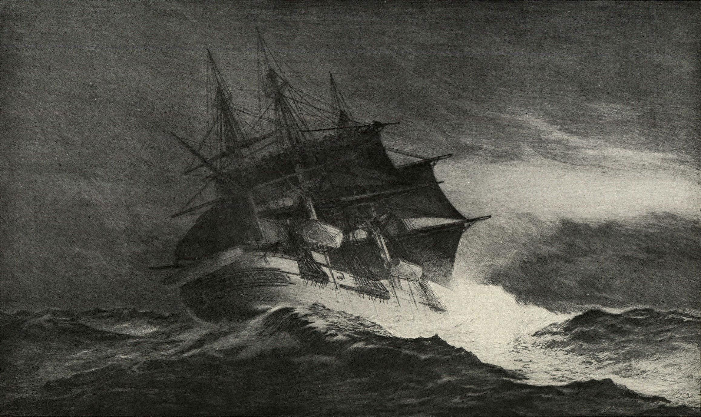 Bottenrefvet (Korvetten Saga), af svenske marinetsaren N. E. Anckers. (Till art. Etsning.)